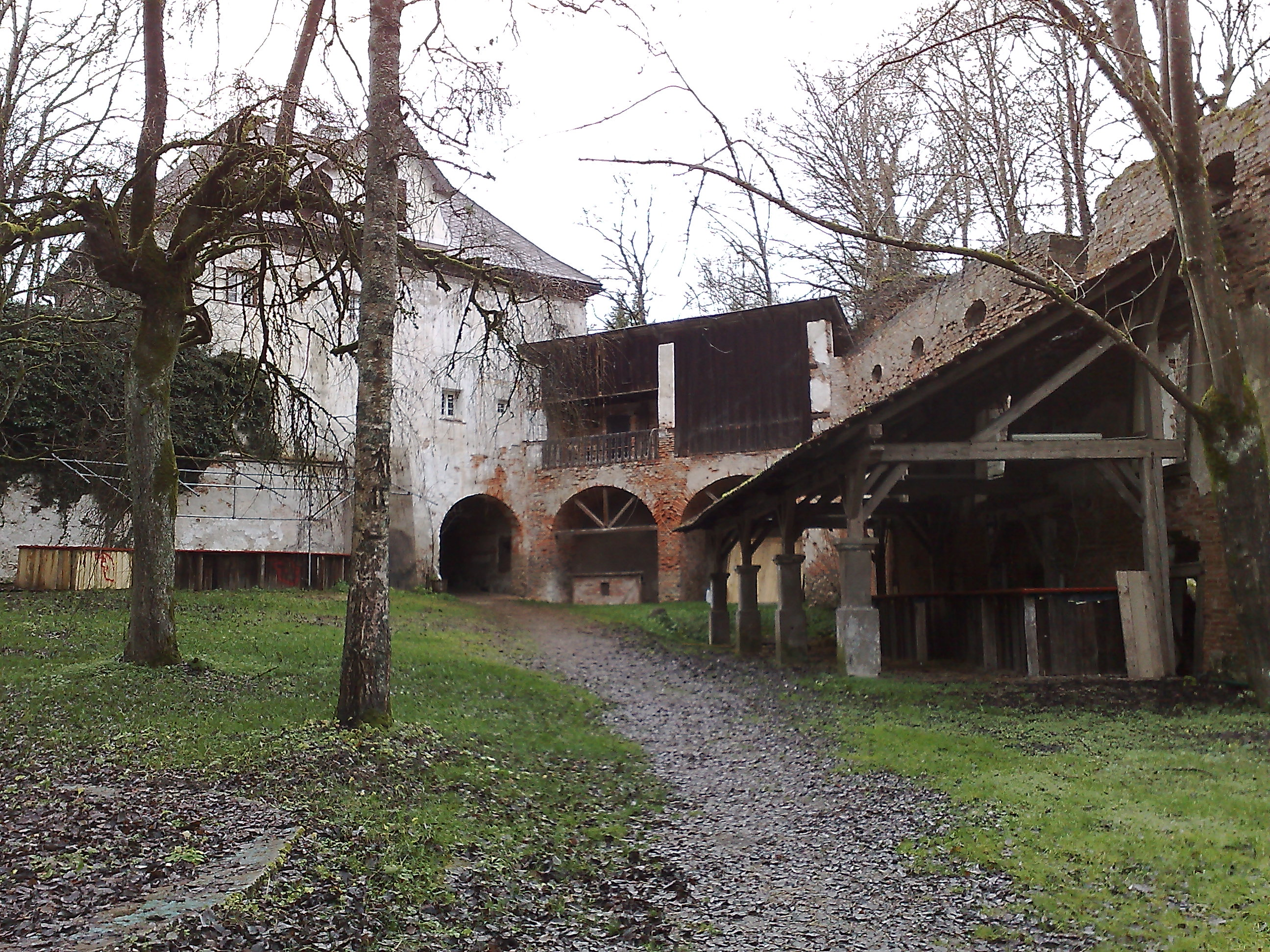 Schloss Alt-Wartenburg, Oberthalheim, Oberösterreich.